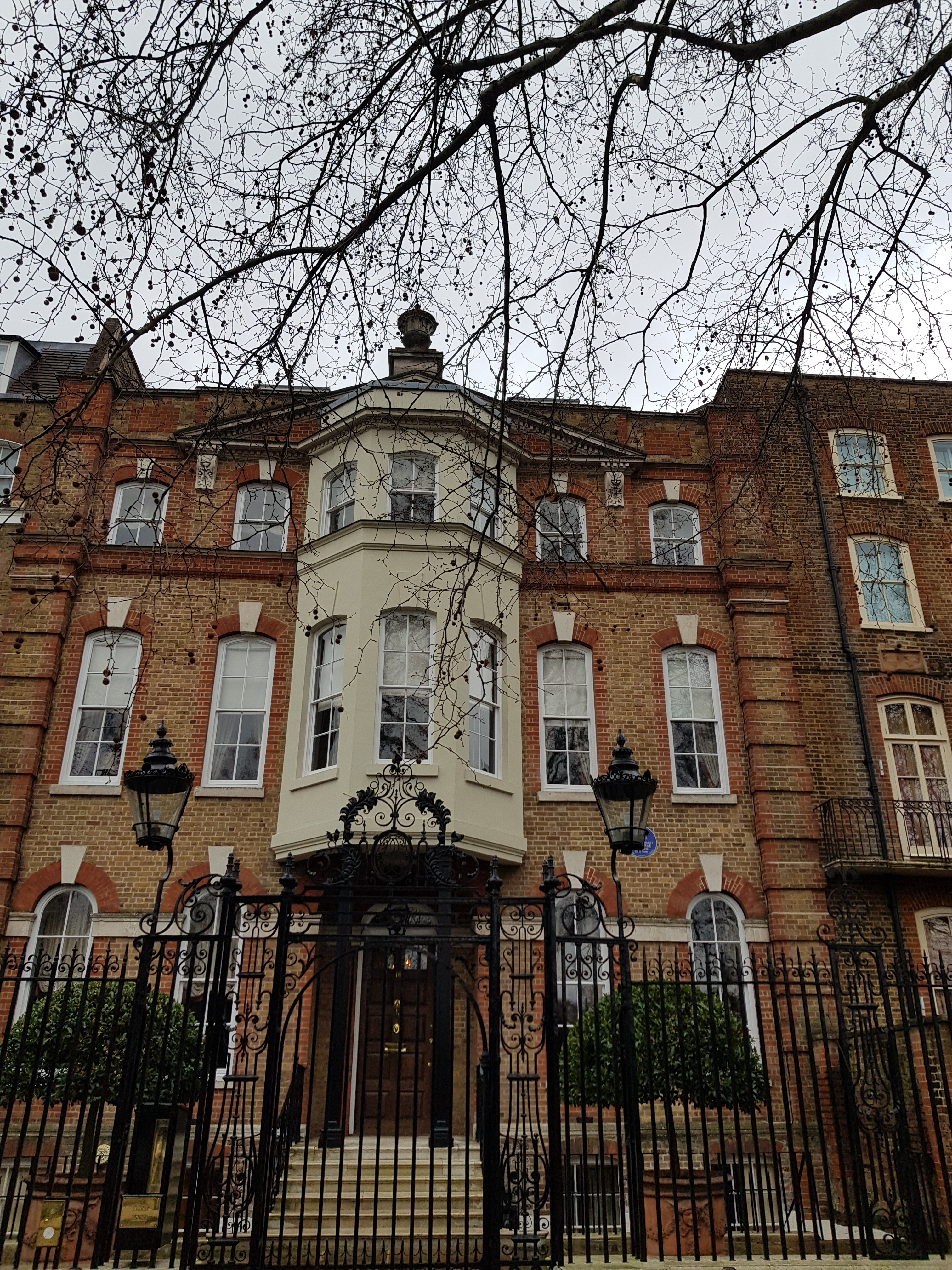 16 Cheyne Walk, Londres, en mars 2019.